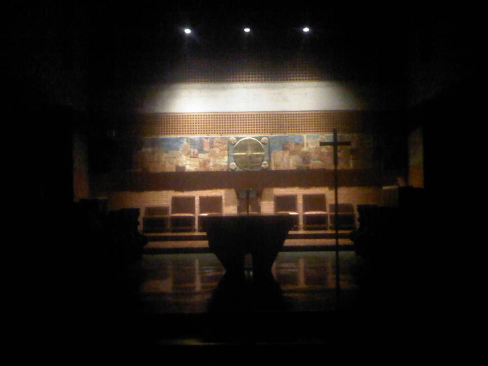 Justo antes de la entrada de los Monjes para recitar las Completas (oraciones antes de dormir) la Iglesia Abacial se ilumina con pequeñas luces sobre el Altar